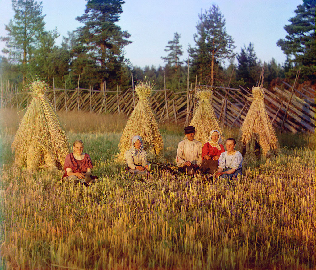 Прокудин-Горский. На жнитве. 1909